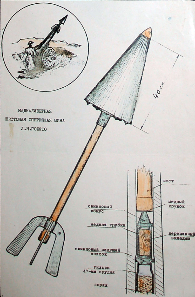 Photograph of the scheme of レオニード・ニコラビッチ・ゴッドヤット's mortar.